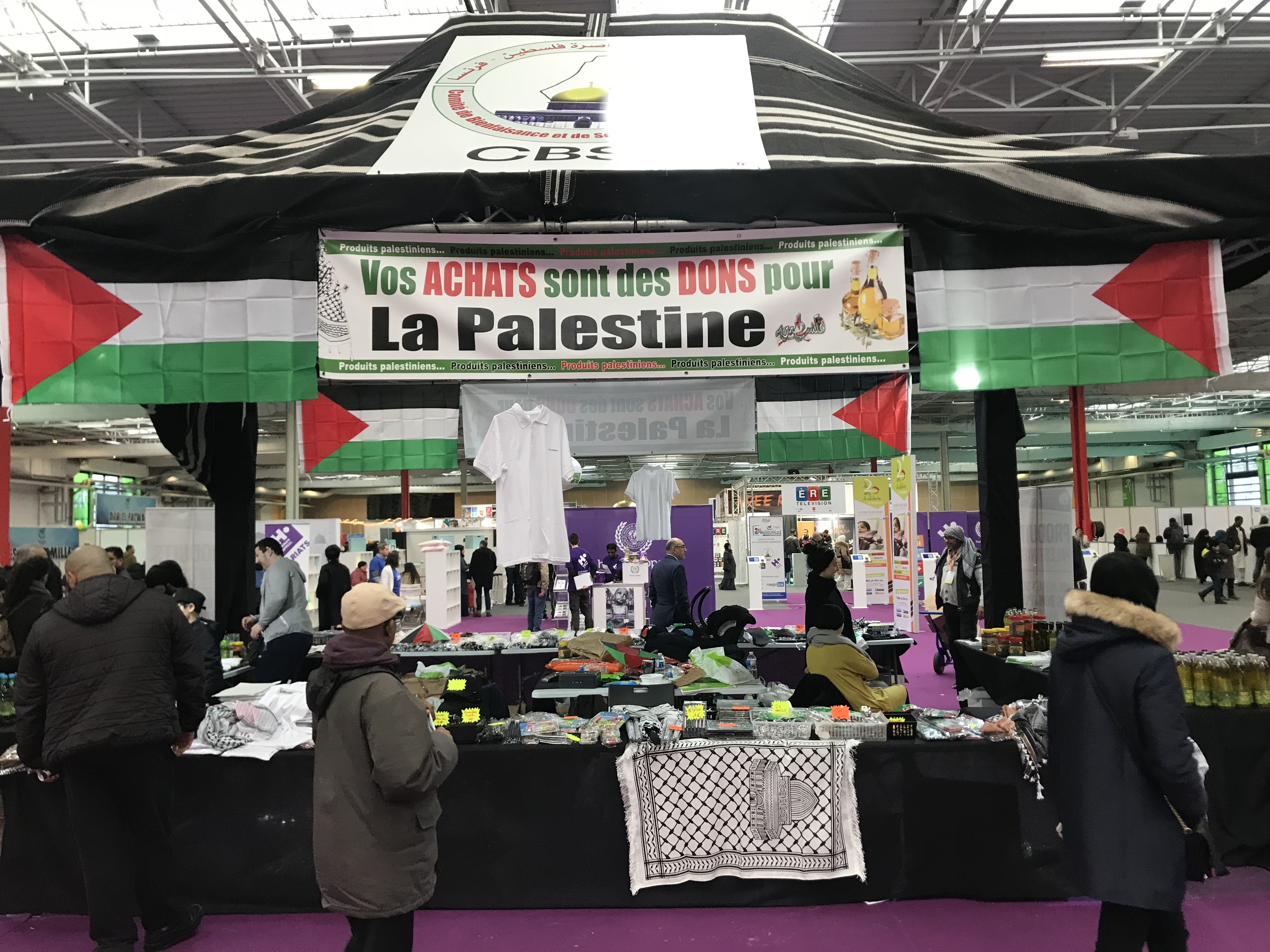 Stand CBSP, à la Rencontre Annuelle des Musulmans de France, 30 mars-2 avril 2018.